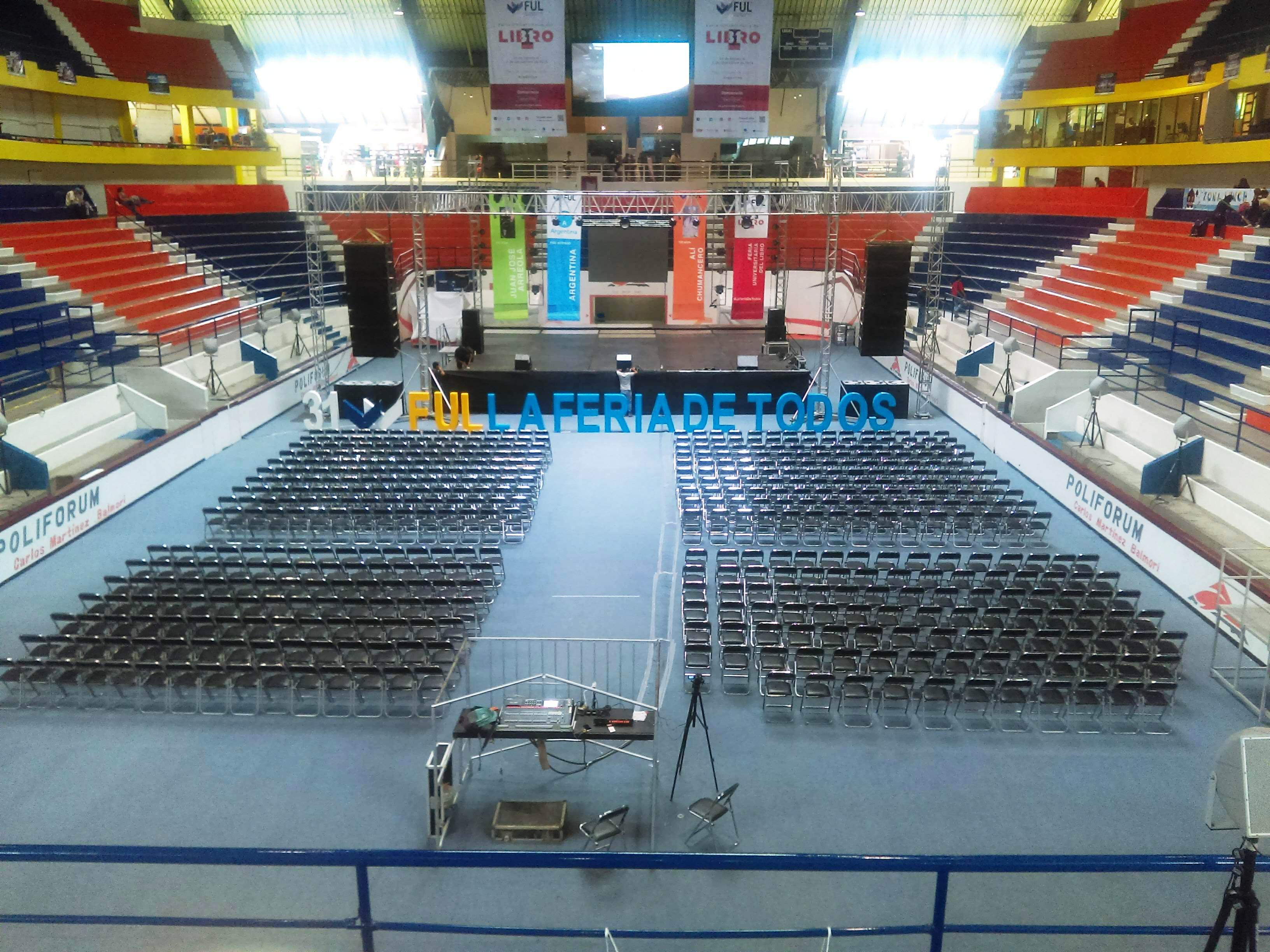 Feria Universitaria del Libro de la UAEH (2018).